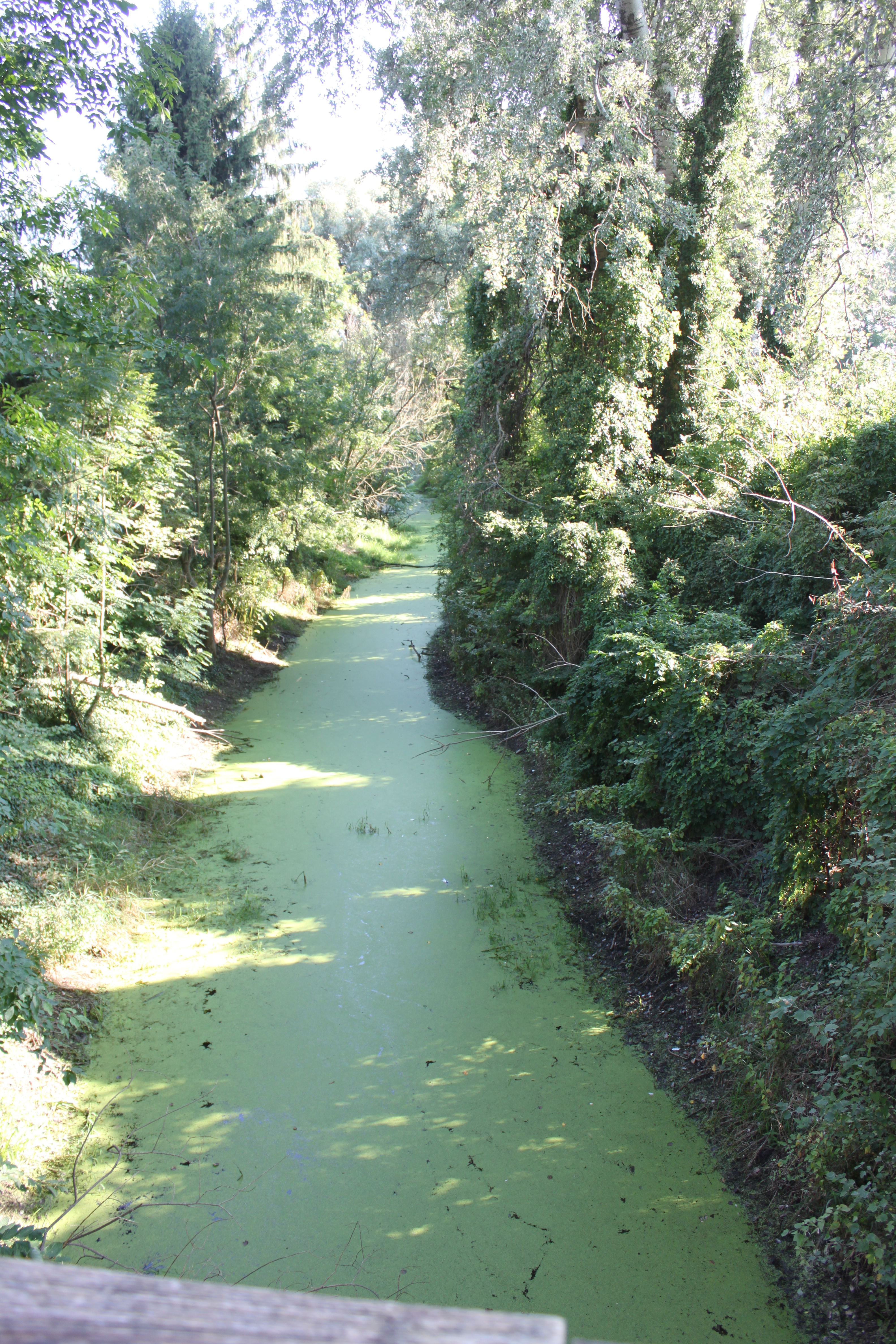 Fadenbach-Brücke Schloss Orth - Schlossinsel, Weiterlauf des Fadenbaches von der Brücke weg